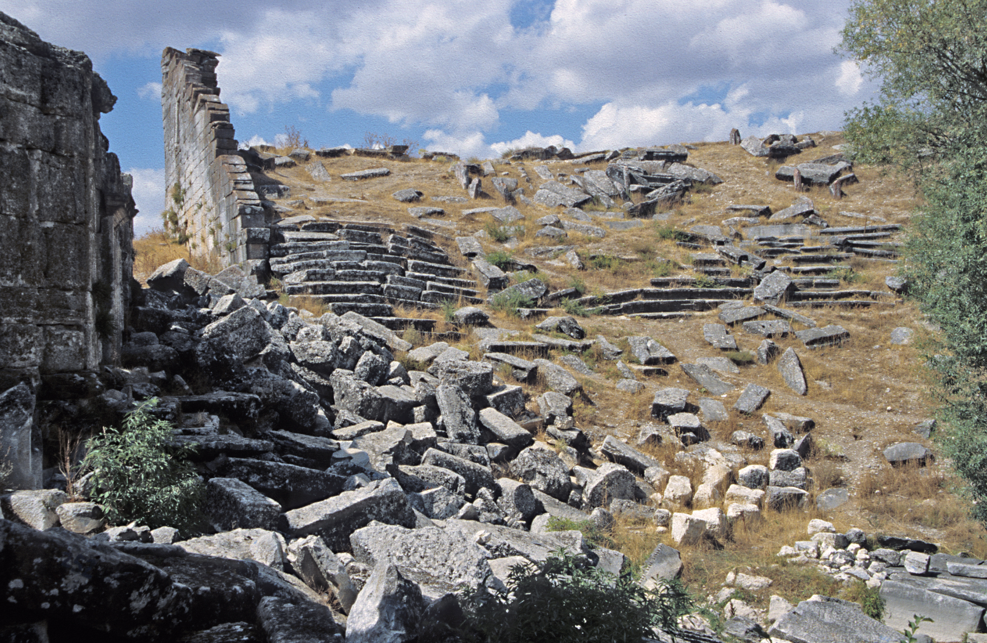 Aizanoi, Westtürkei, Theater